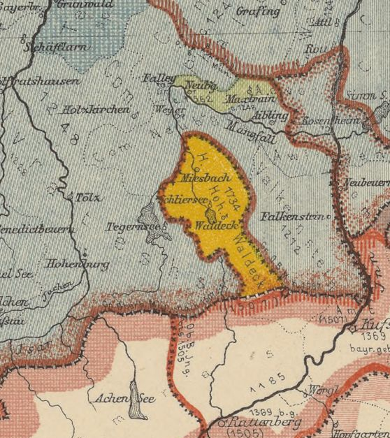 Historische Karte von Bayern zur Übersicht der territorialen Entwicklung von 1180 bis 1883. Originalgröße ca. 74,88 × 56,53 cm.[1]